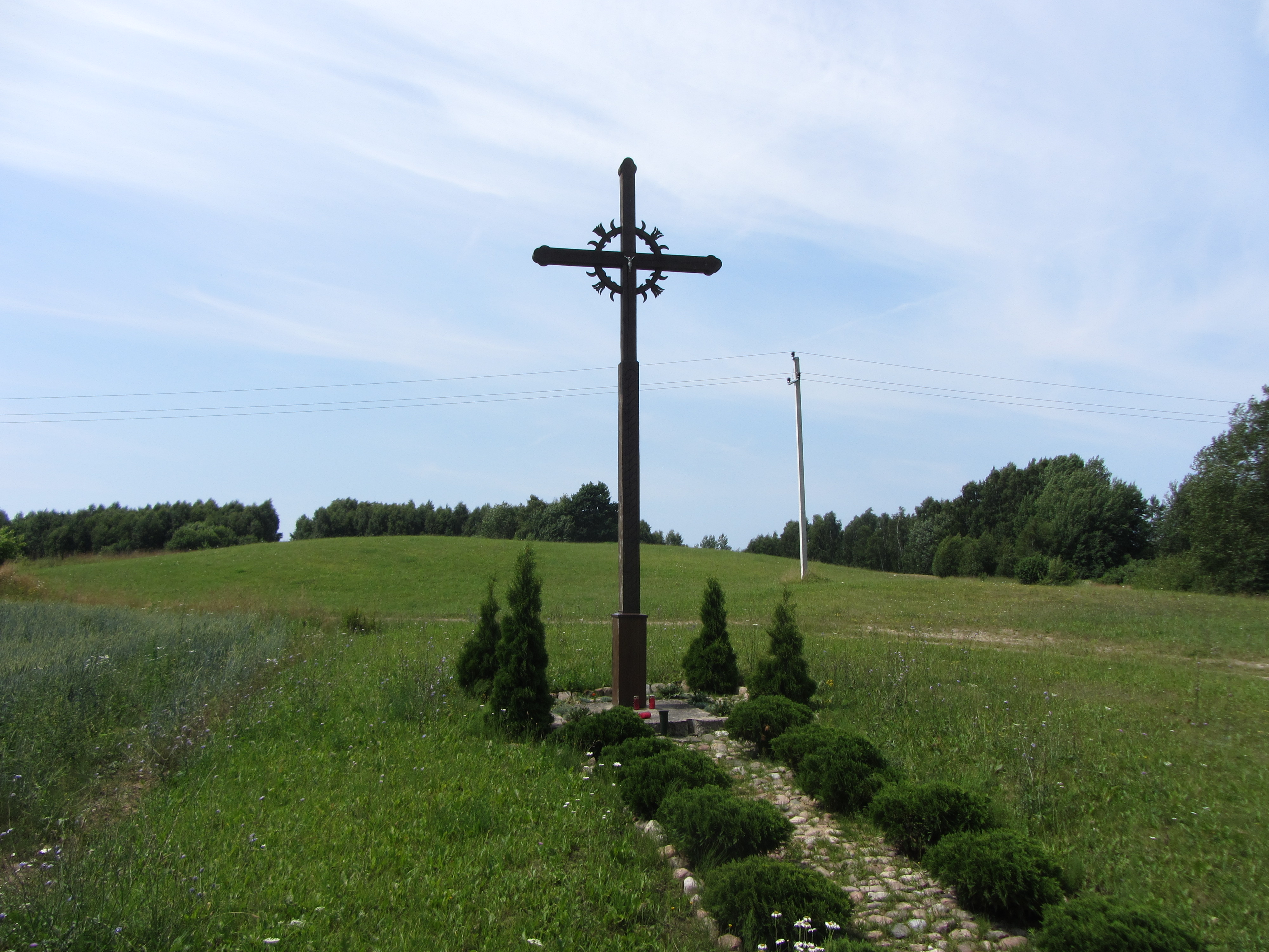 Stračiūnai, Lithuania